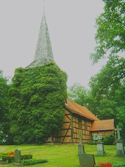 Kirche und Friedhof in Stuer, Mecklenburg-Vorpommern, Müritzkreis